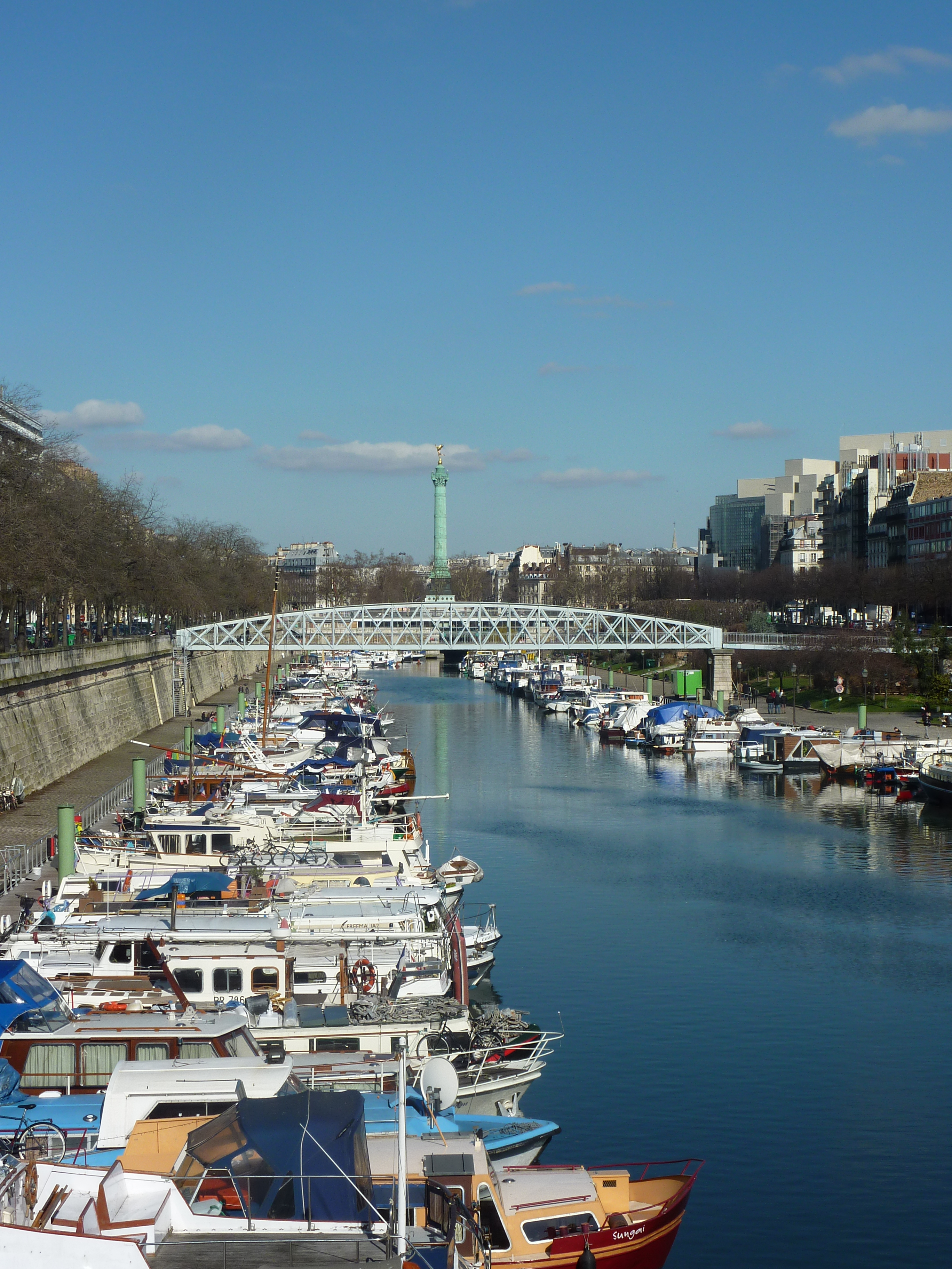 Le Port de l'Arsenal